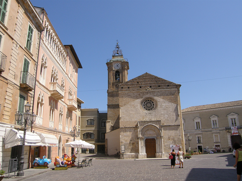 Vasto